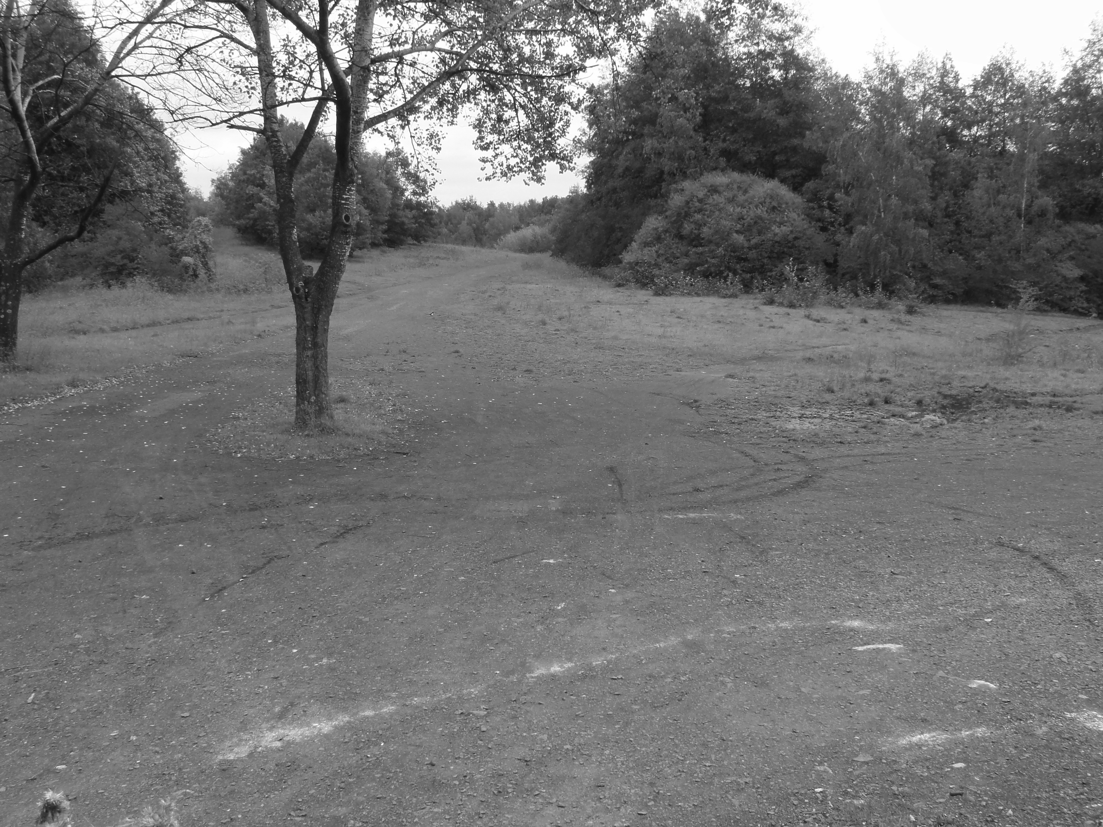 Terril n° 70C1+C2 dit 3 - 4 de Meurchin, fosse n° 3 - 4 de la Compagnie des mines de Meurchin, Wingles, Pas-de-Calais, Nord-Pas-de-Calais, France.